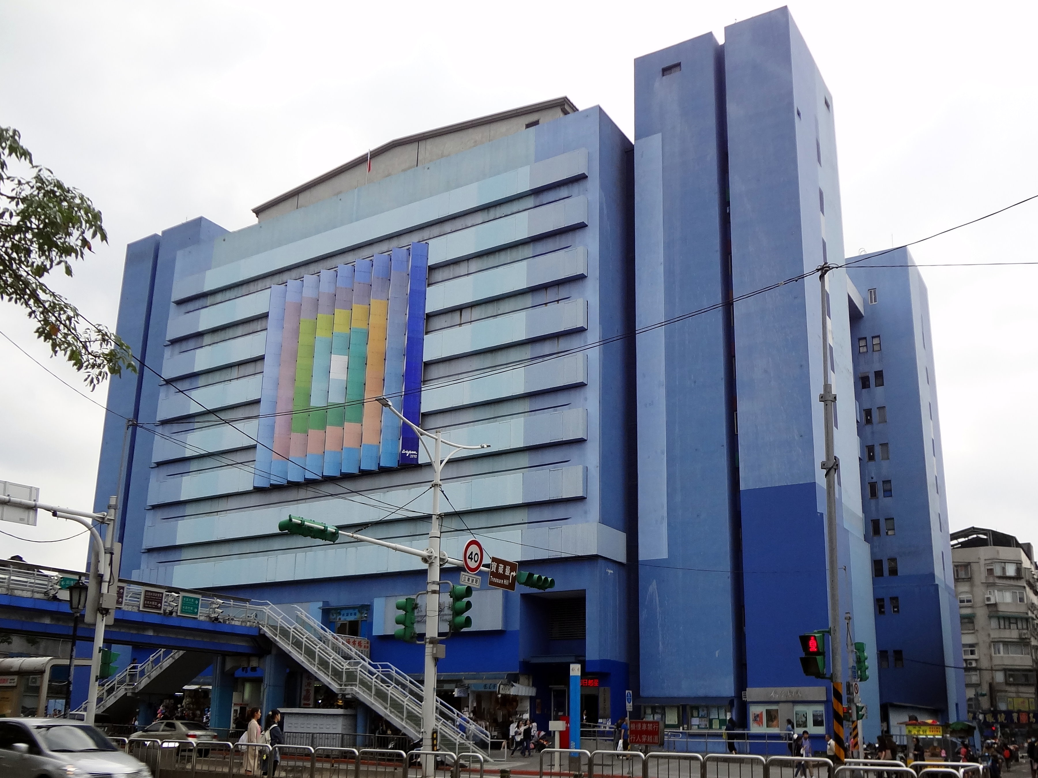 臺北市水源大樓。